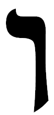 hebrew letter vav